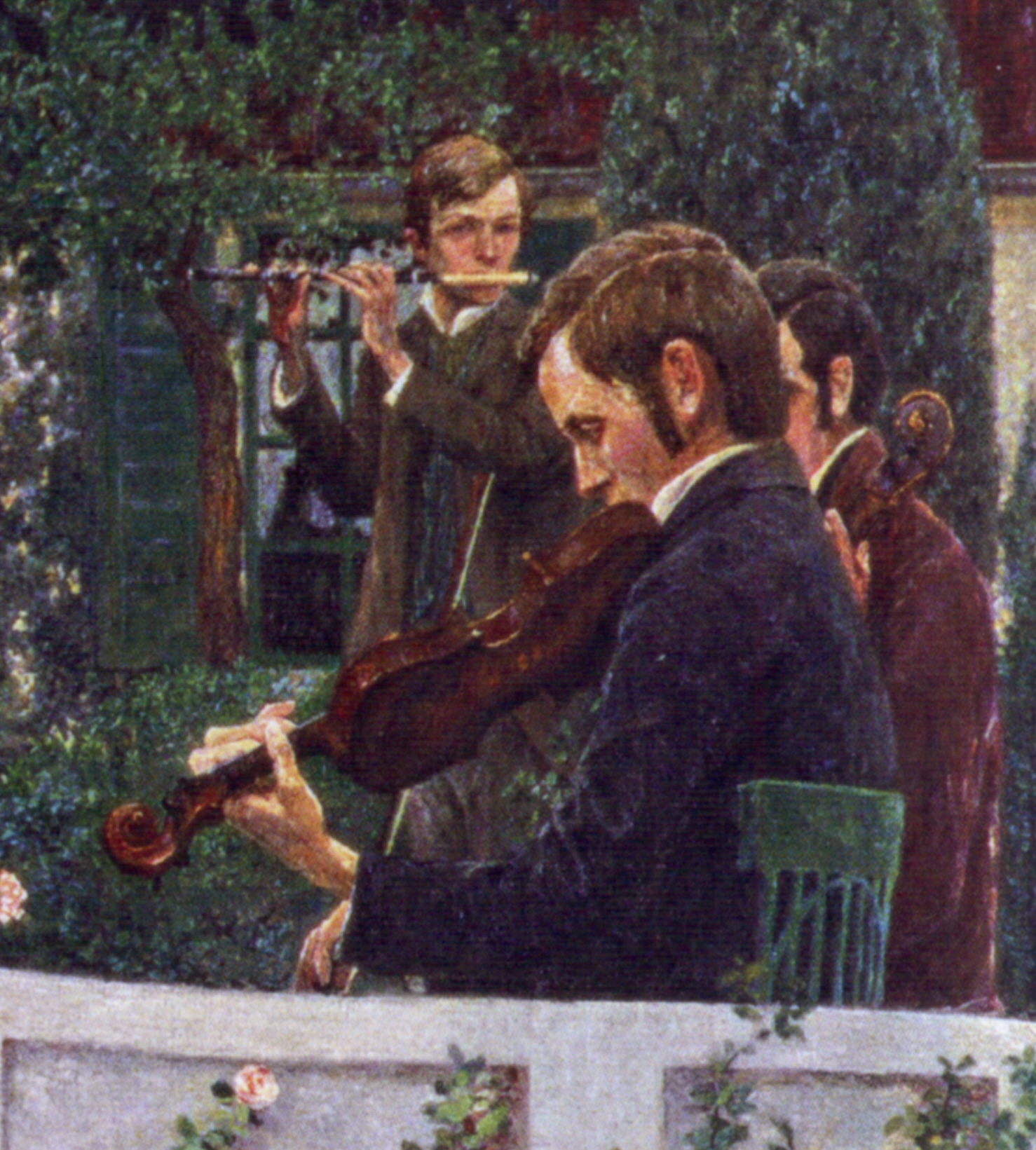 Detail aus: Sommerabend (Das Konzert). Öl auf Leinwand, 175 x 310 cm. Große Kunstschau Worpswede; Detail: Franz Vogeler (Bruder des Malers), Martin Schröder (Schwager des Malers) und verdeckt Heinrich Vogeler musizierend